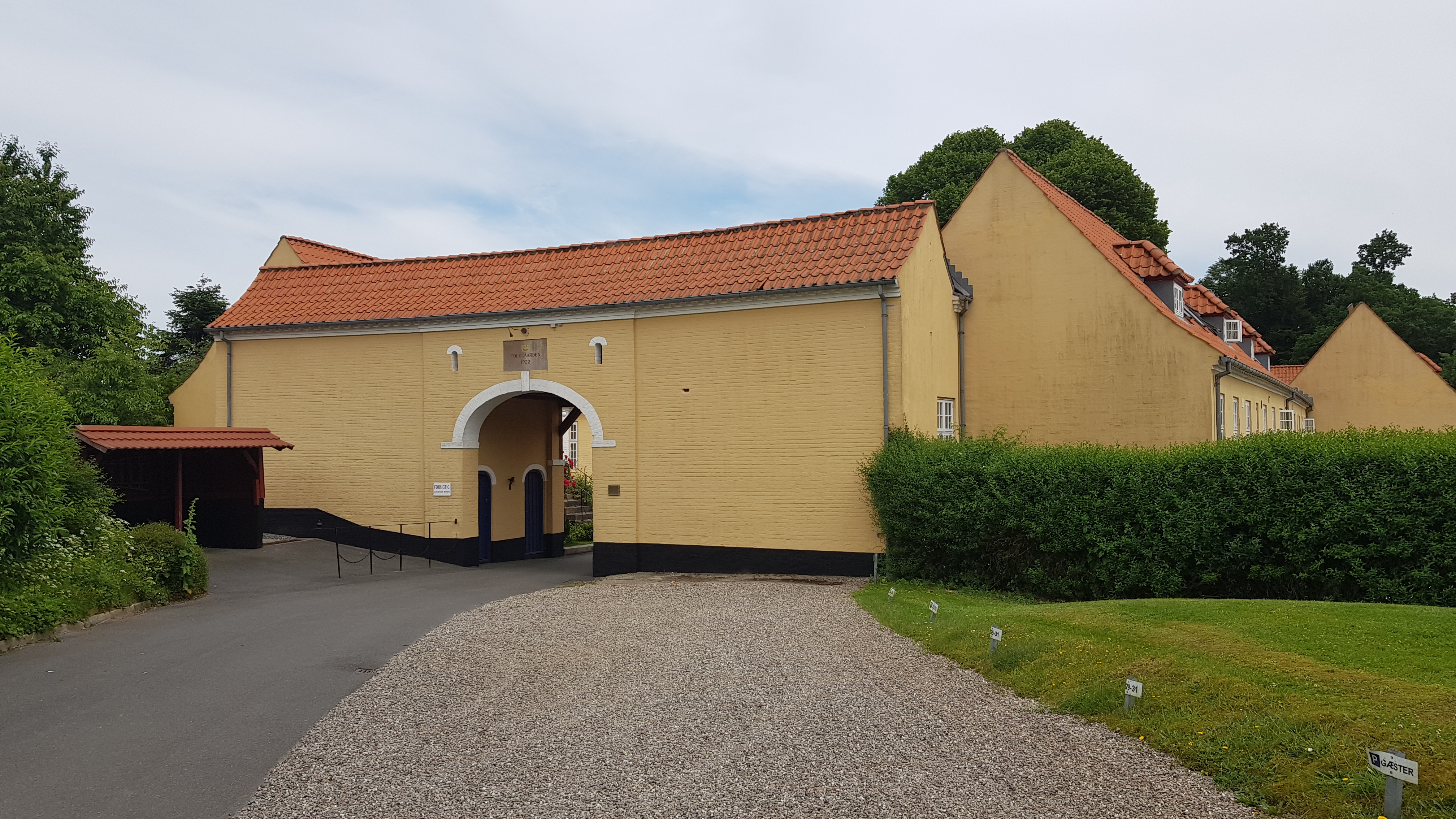 Toldgården i Padborg